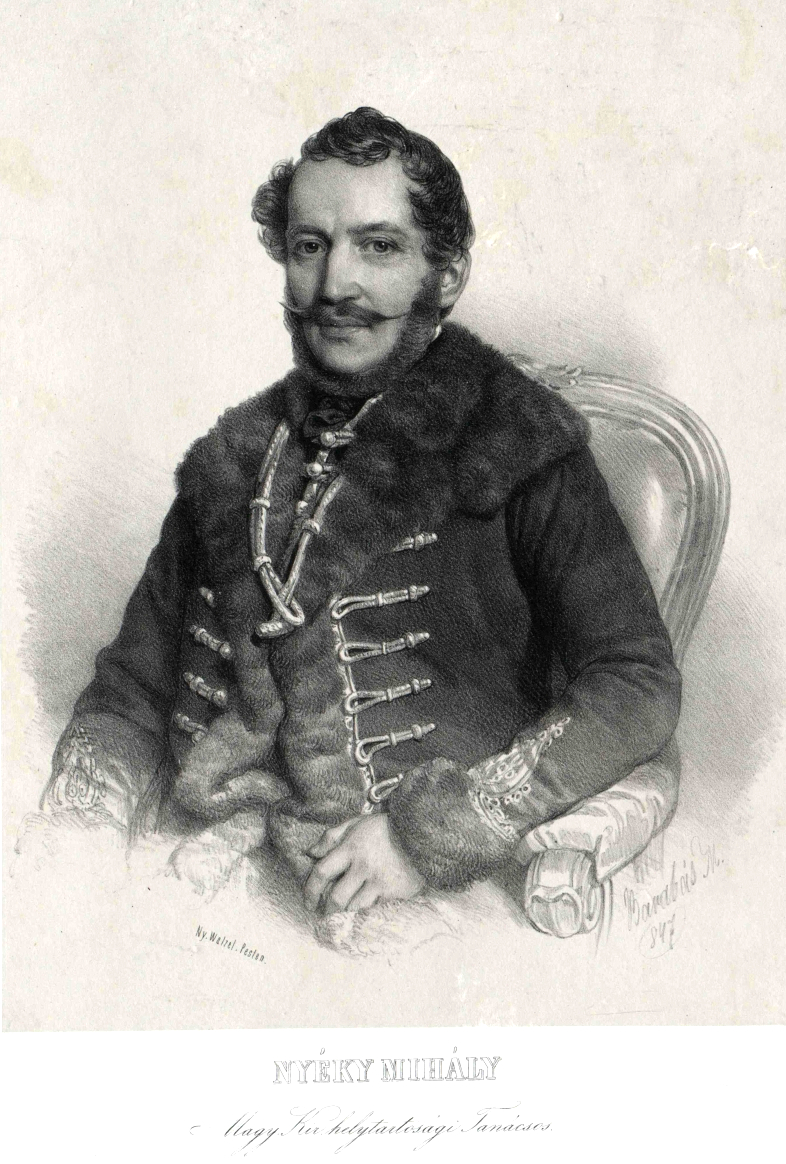 Nyéky Mihály (?, 1789–Pest, 1862. dec. 7.): színházigazgató. Mint a nemzeti színházi comite tagja, 1854. nov. 8-tól az évad végéig igazgatói megbízást kapott. 1860. júl. 11-től ismét átvette az igazgatást, amelyet betegsége miatt Szigligeti Ede segítségével 1862 jún.-áig végzett. Nevéhez fűződik a hazai Offenbach-kultusz elindítása.